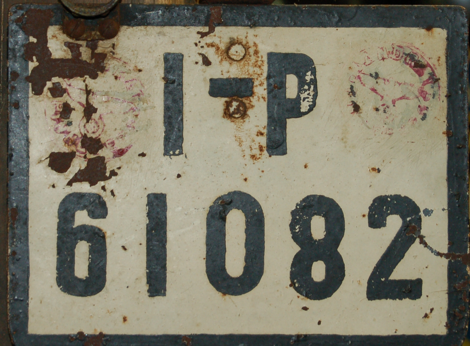 Historisches Nummernschild der Provinz Schleswig-Holstein im Deutschen Reich 1906–1945